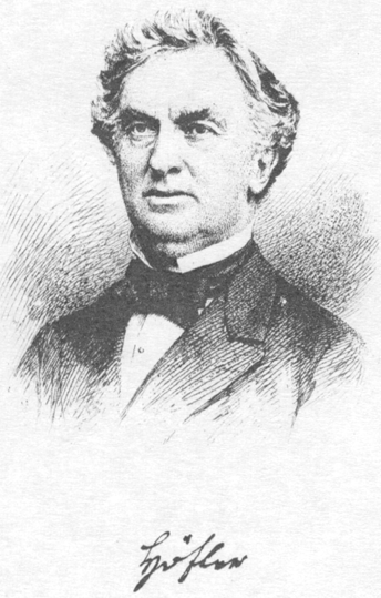 Konstantin Höfler, Bayerischer Historiker